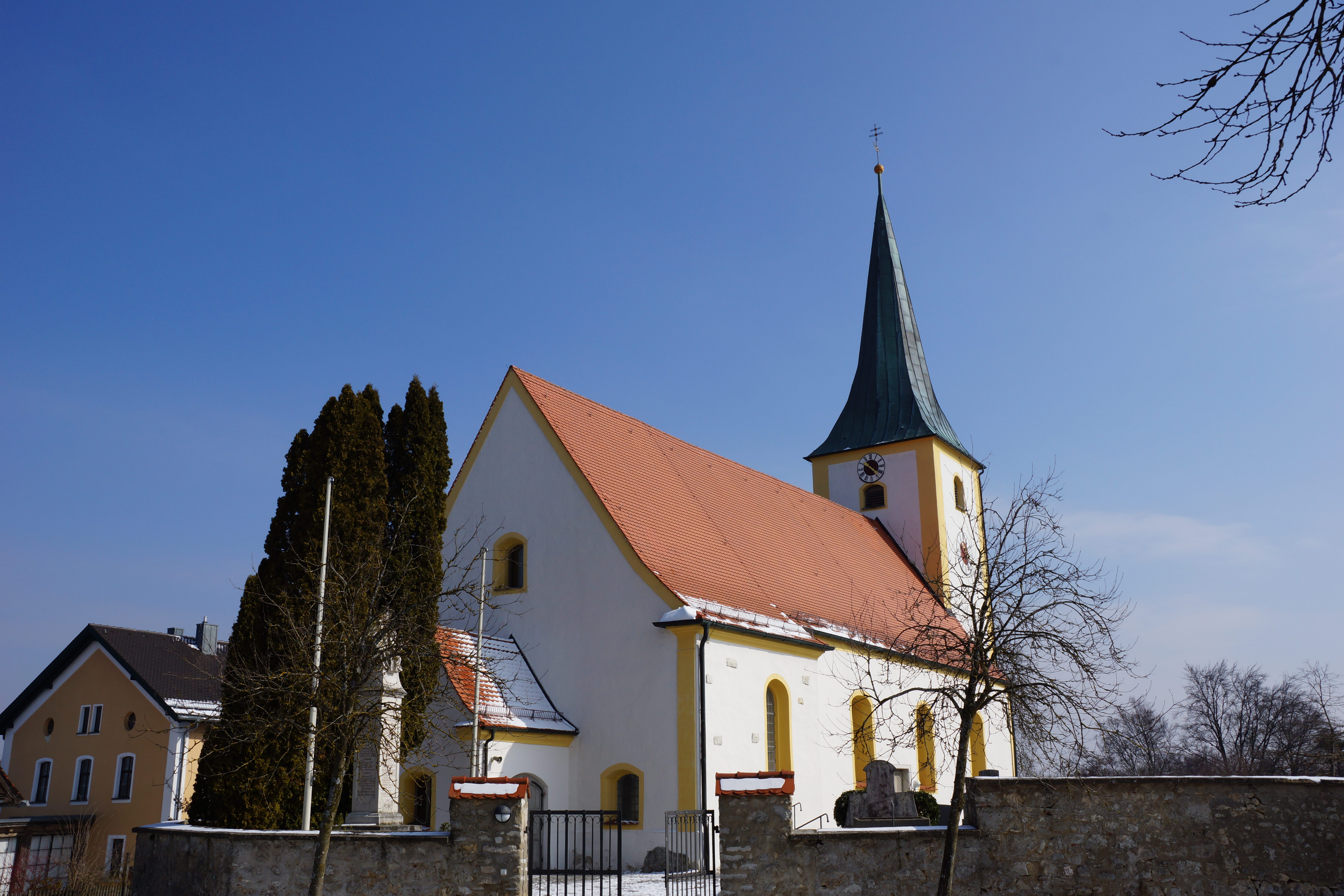 Die Wallfahrtskirche St. Peter und Paul im Oberpfälzischen Waldkirchen